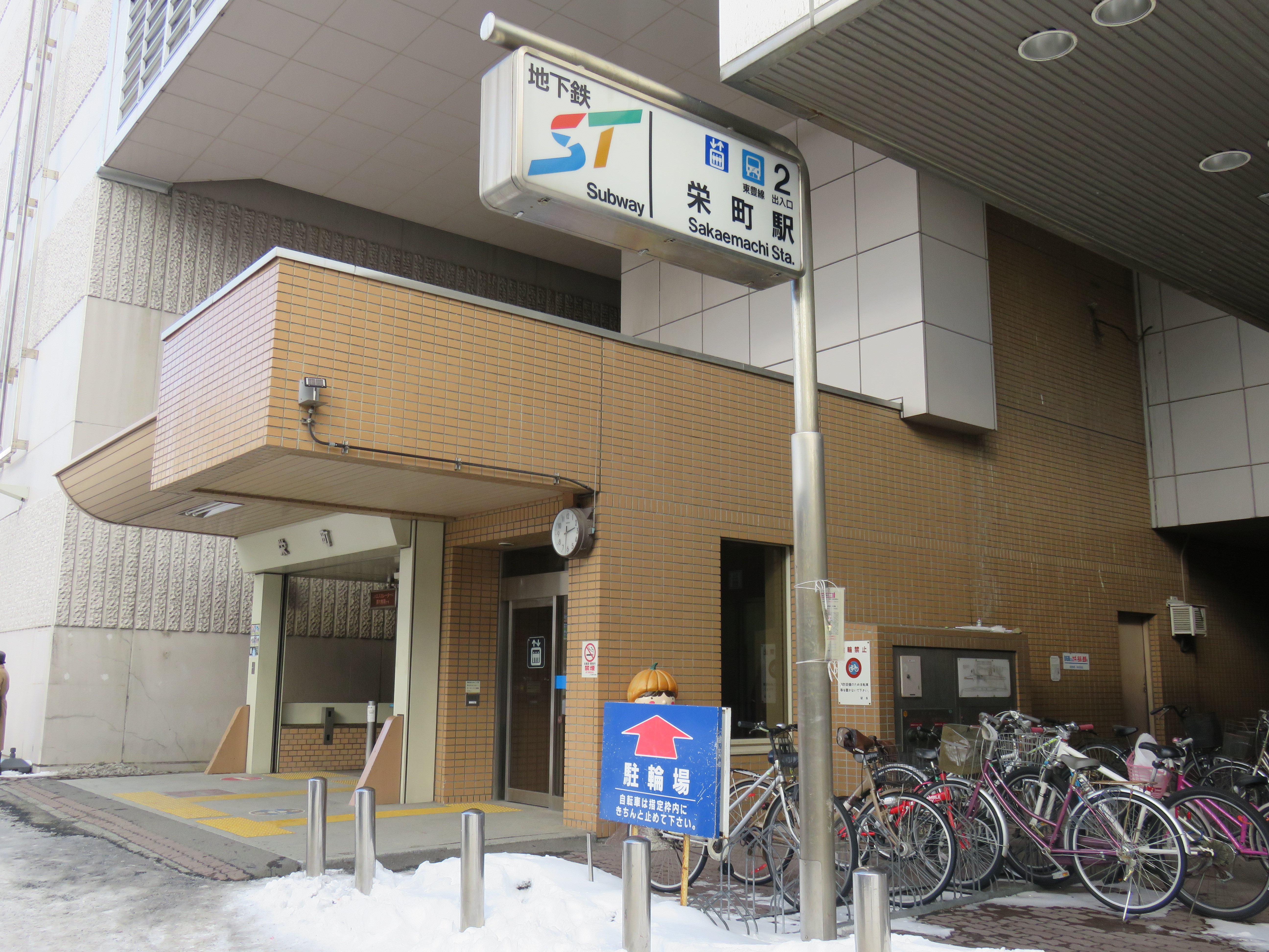 栄町駅2番出入口